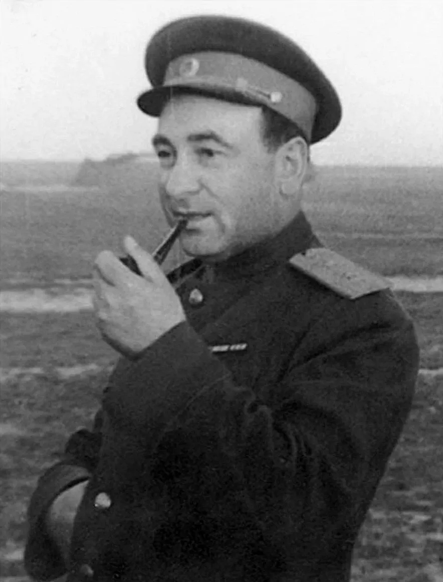 Начальник Центрального штаба партизанского движения при Ставке Верховного Главнокомандования генерал-лейтенант П.К. Пономаренко